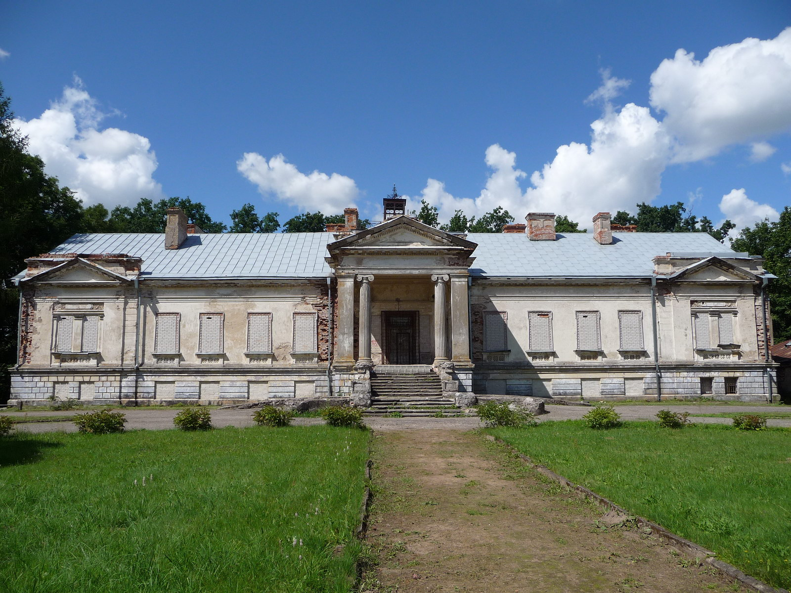 Gelgaudiškio dvaro rūmai iš pietų pusės iki rekonstrukcijos